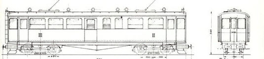 Typenskizze BCFe 4/4 21–23 der damaligen Berninabahn